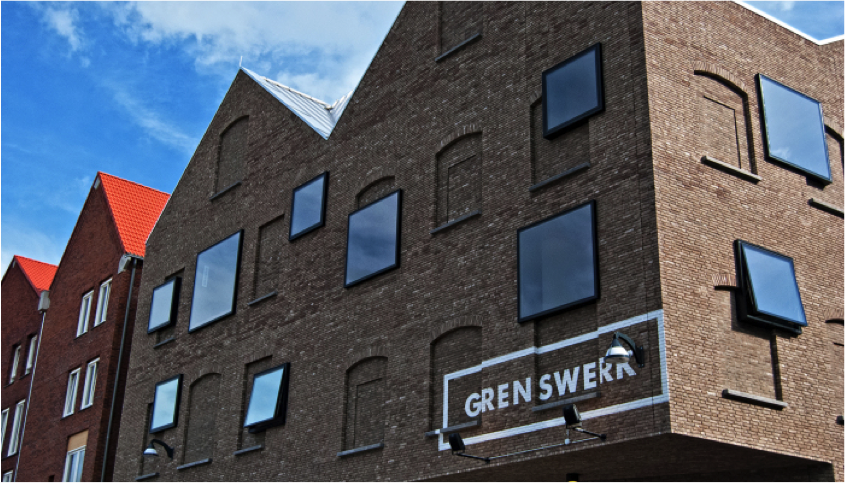 Poppodium Grenswerk, Venlo (Limburg)